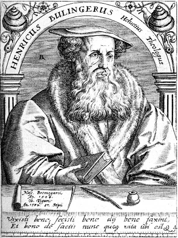 Heinrich Bullinger Theologe und Reformator Kupferstich 17 Jahrhundert